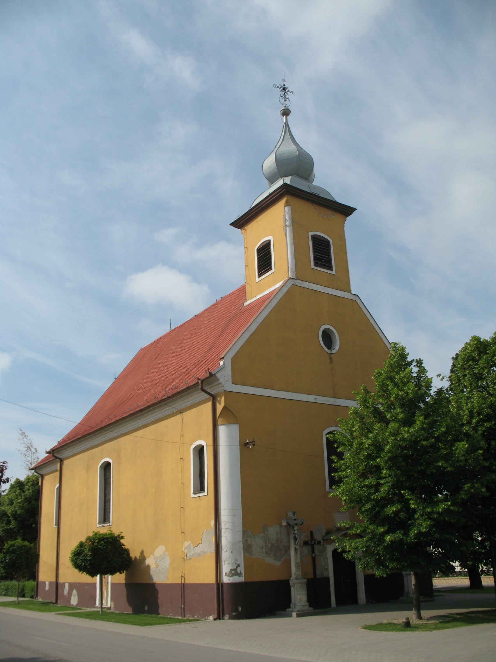 Váhovce - rímskokatolícky kostol sv. Mikuláša